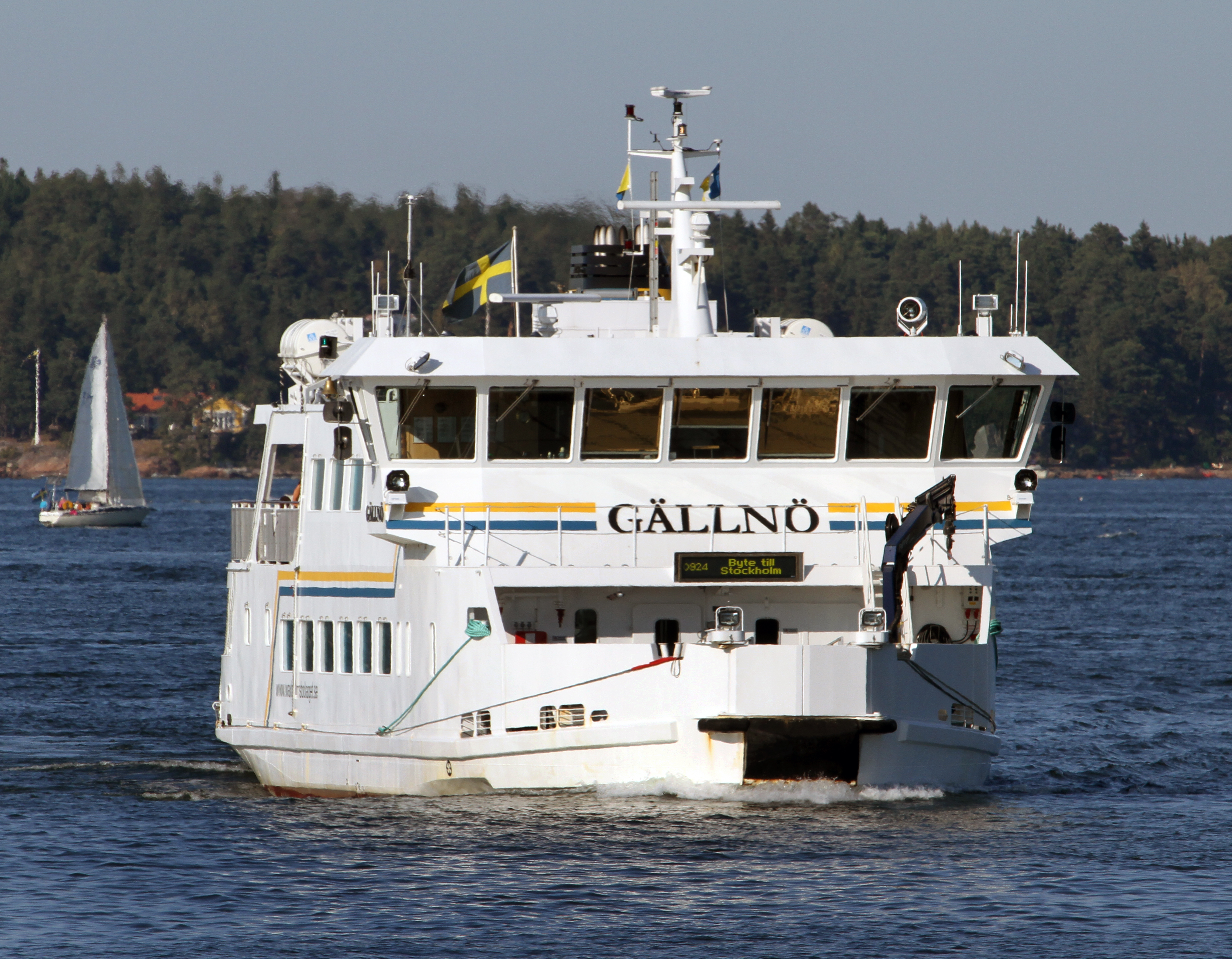 Gällnö på Trälhavet 25 juli 2014